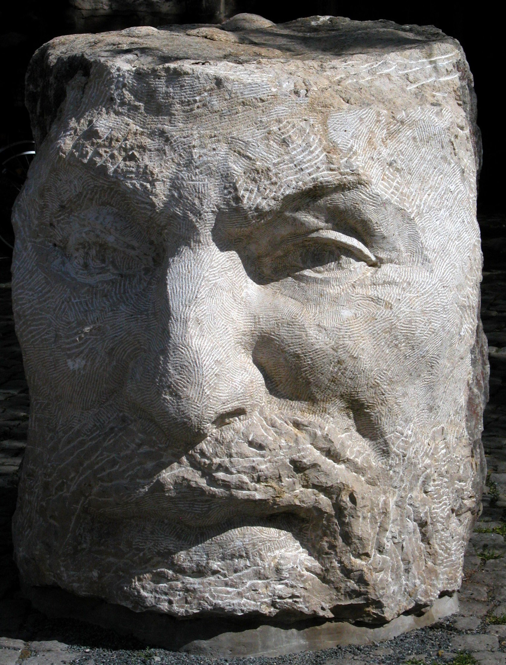 Braunschweig: Kunstwerk, Südwestseite der Martinikirche.